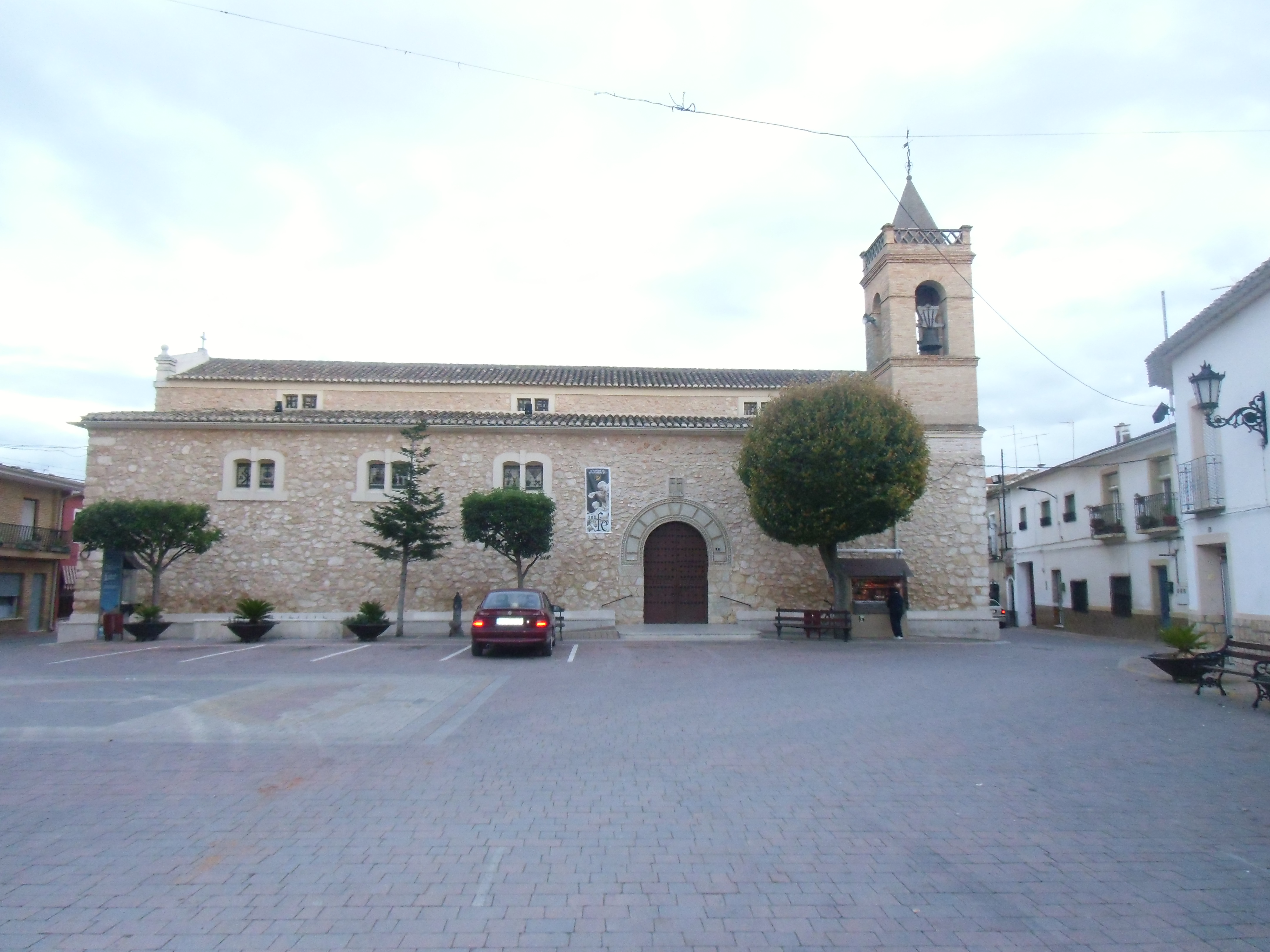 Iglesia Pusrísima Concepción